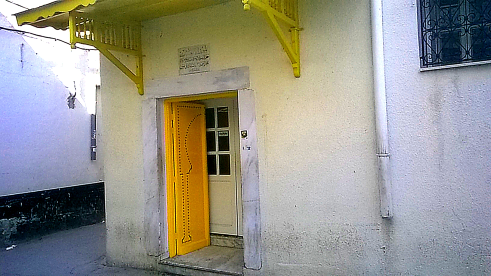 La médina de Tunis مدينة تونس العتيقة